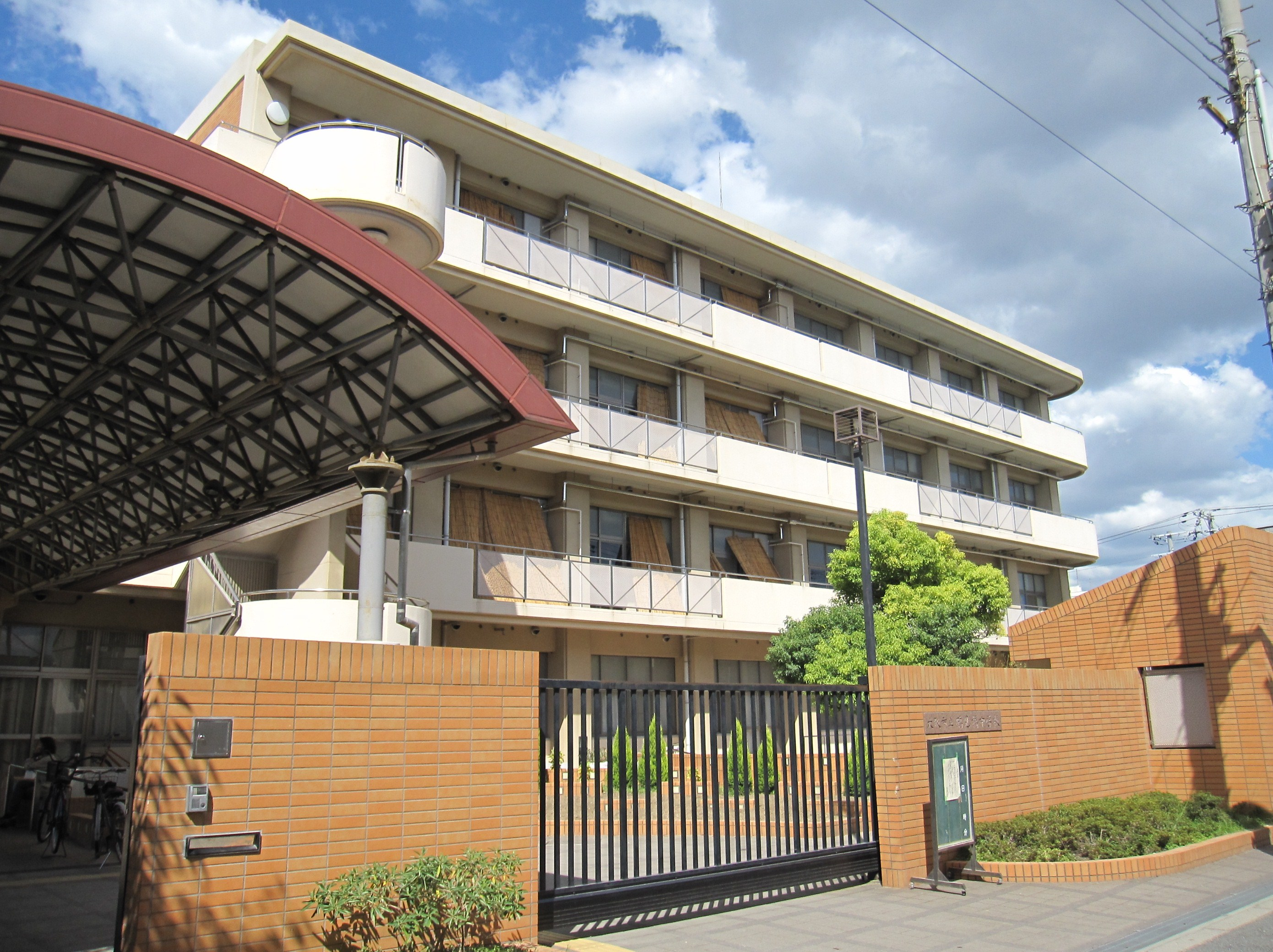 大阪市立鶴見橋中学校